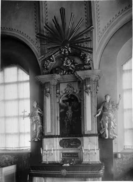 Altaruppsats, 1700. Kategori: (05) AltarprydnaderAltaruppsats, 1700.